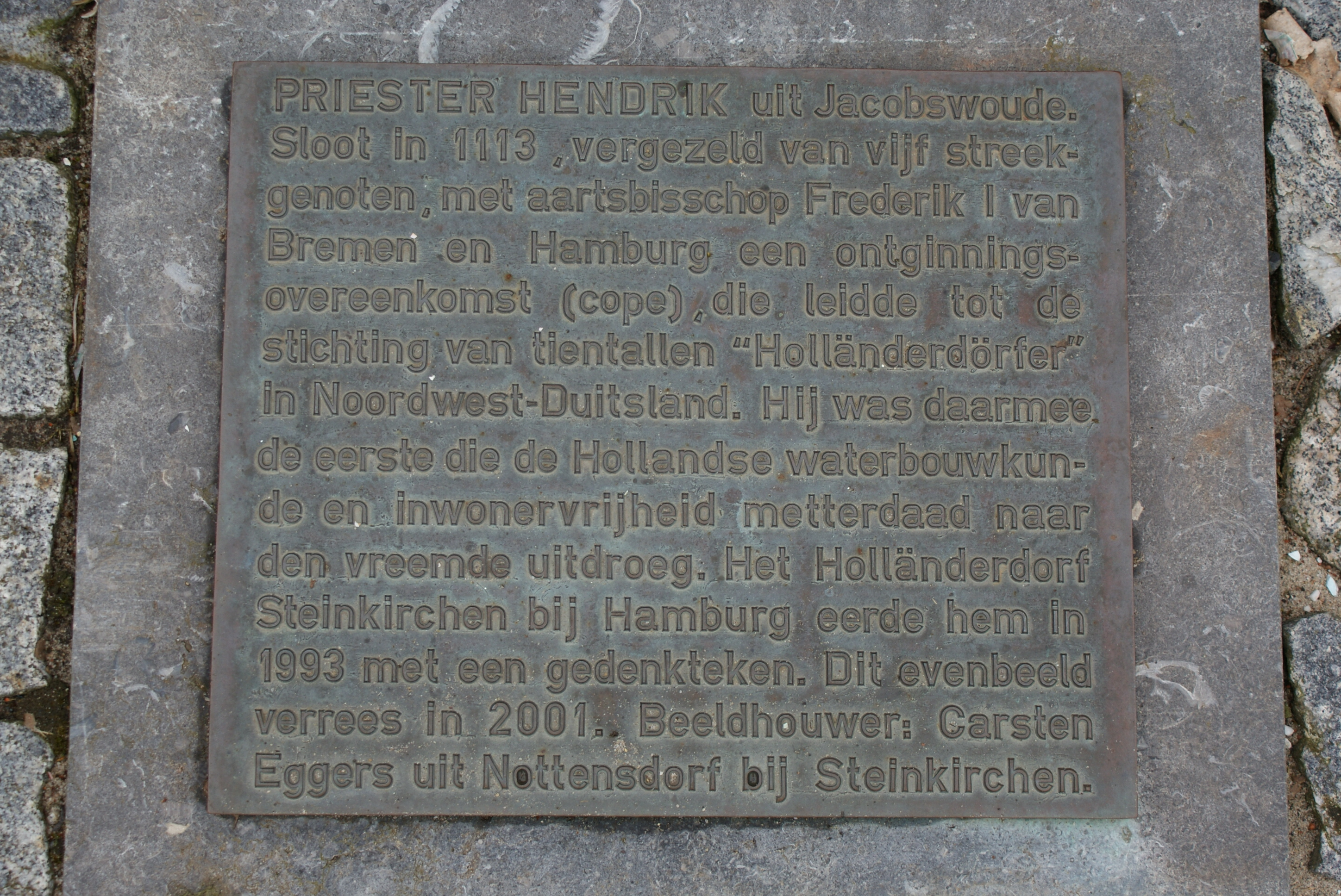 Voor het beeld van Priester Hendrik meldt een metalen plaat in het plaveisel de herkomst van dit beeld